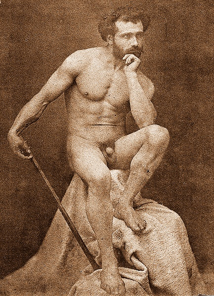 Gaudenzio Marconi (1841-1885), Nudo maschile accademico, 1865 ca.